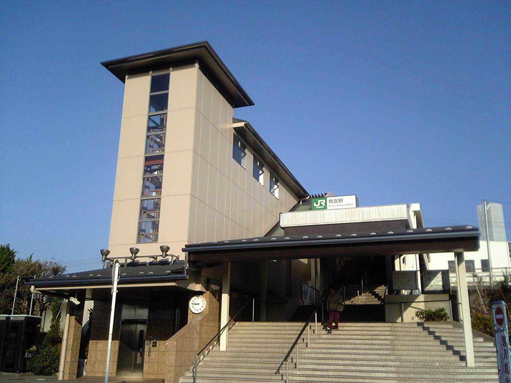 Kamonomiya Station on Tokaido Main Line, Odawara, Kanagawa 鴨宮駅